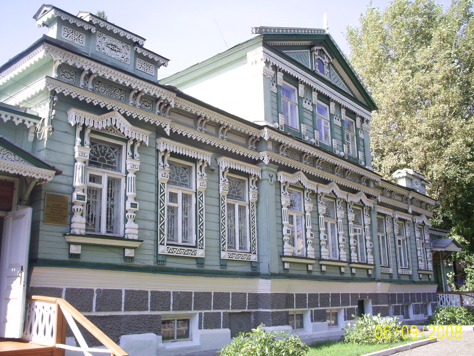 Музей народного творчества в Пензе